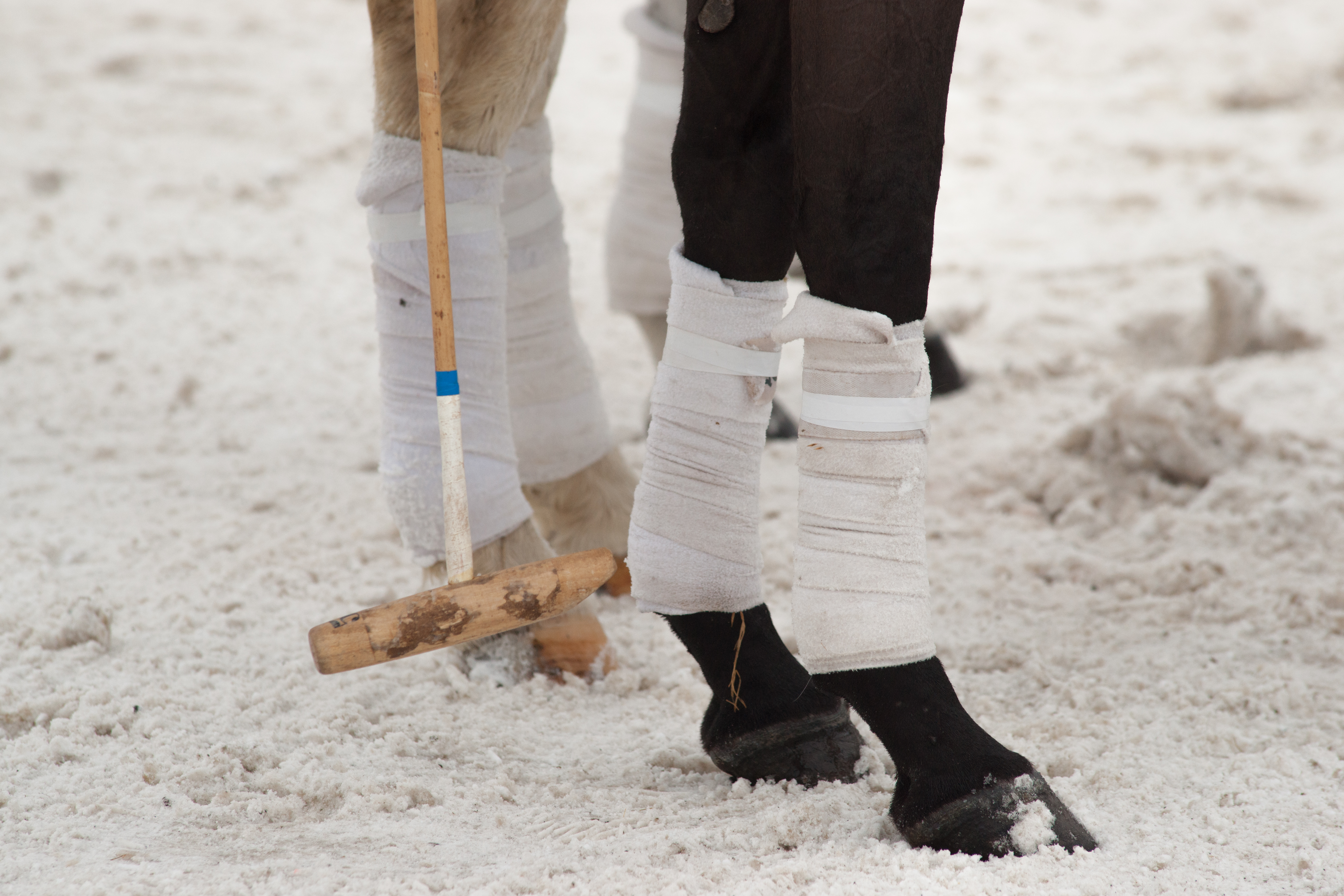 BMW Polo Masters Megève 2014 - bandages